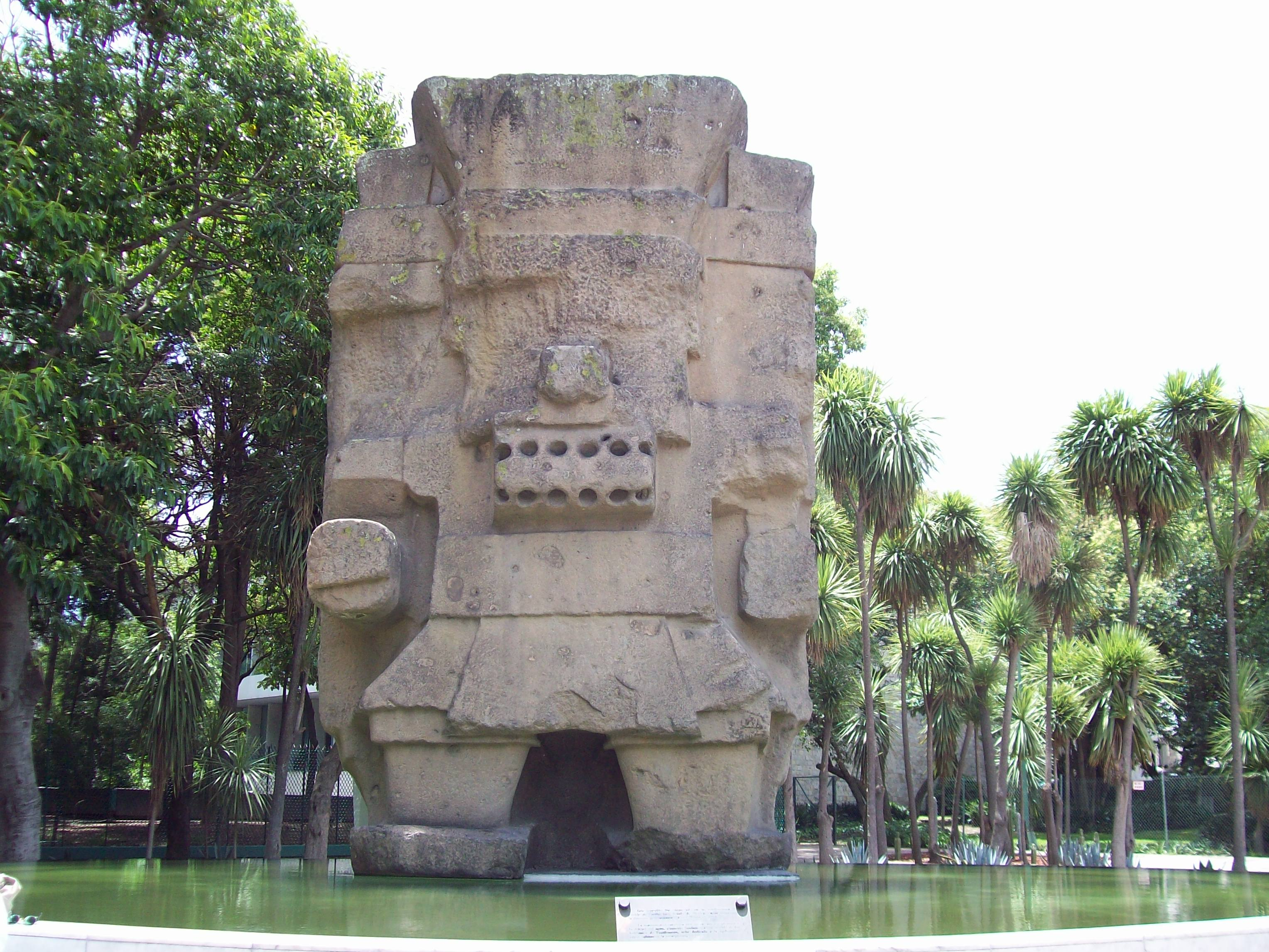 Tlaloc en el Museo Nacional de Antropología de la Ciudad de México